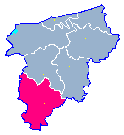 Locator maps for communes in województwo zachodniopomorskie : Rymań gm.png (podział na gminy)